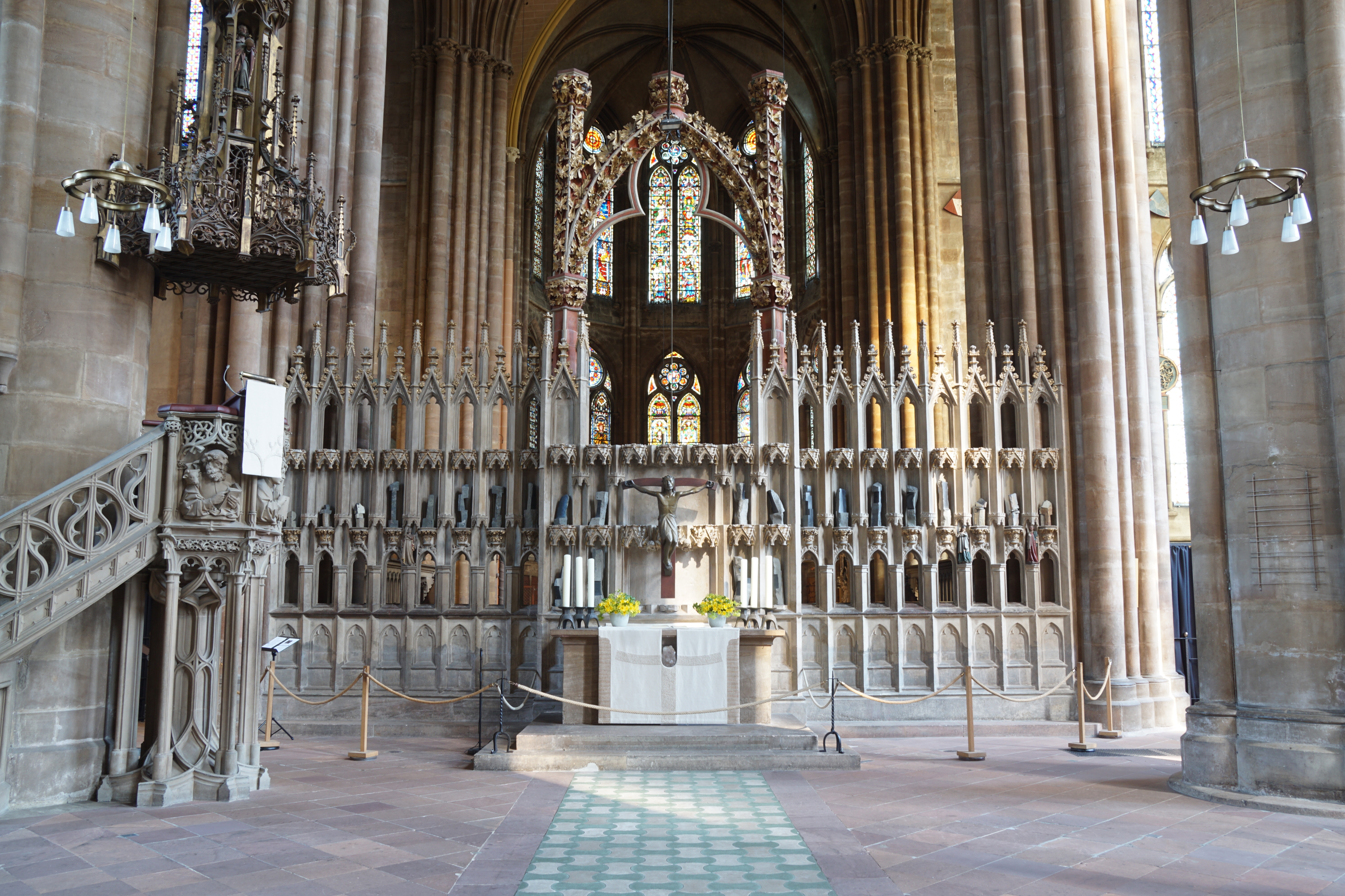 Siehe Dateiname